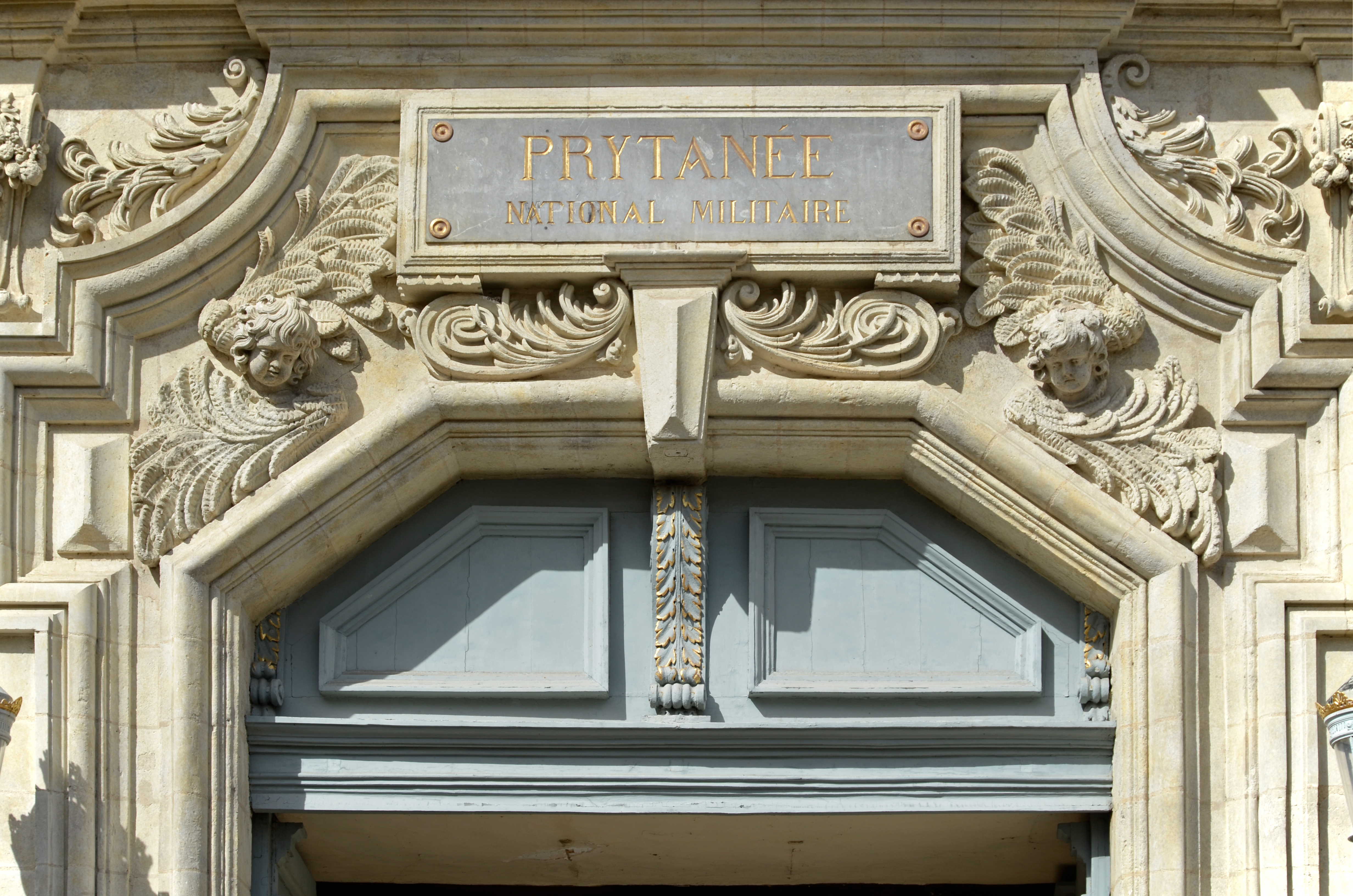 Ancien collège des Jésuites, actuellement Prytanée national militaire - La Flèche (Sarthe) .